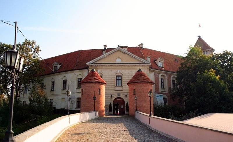 Polska